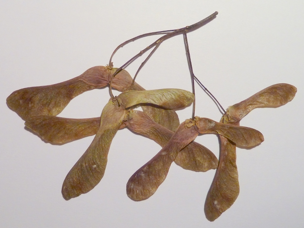 Acer cappadocicum (Arce de Capadocia) : Sámaras secas - Parque del Buen Retiro, Madrid (España).